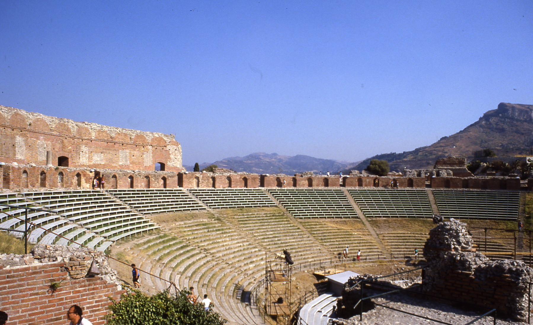 photo par moi-même, libre d'utilisation Licensing Catégorie:Amphithéâtre